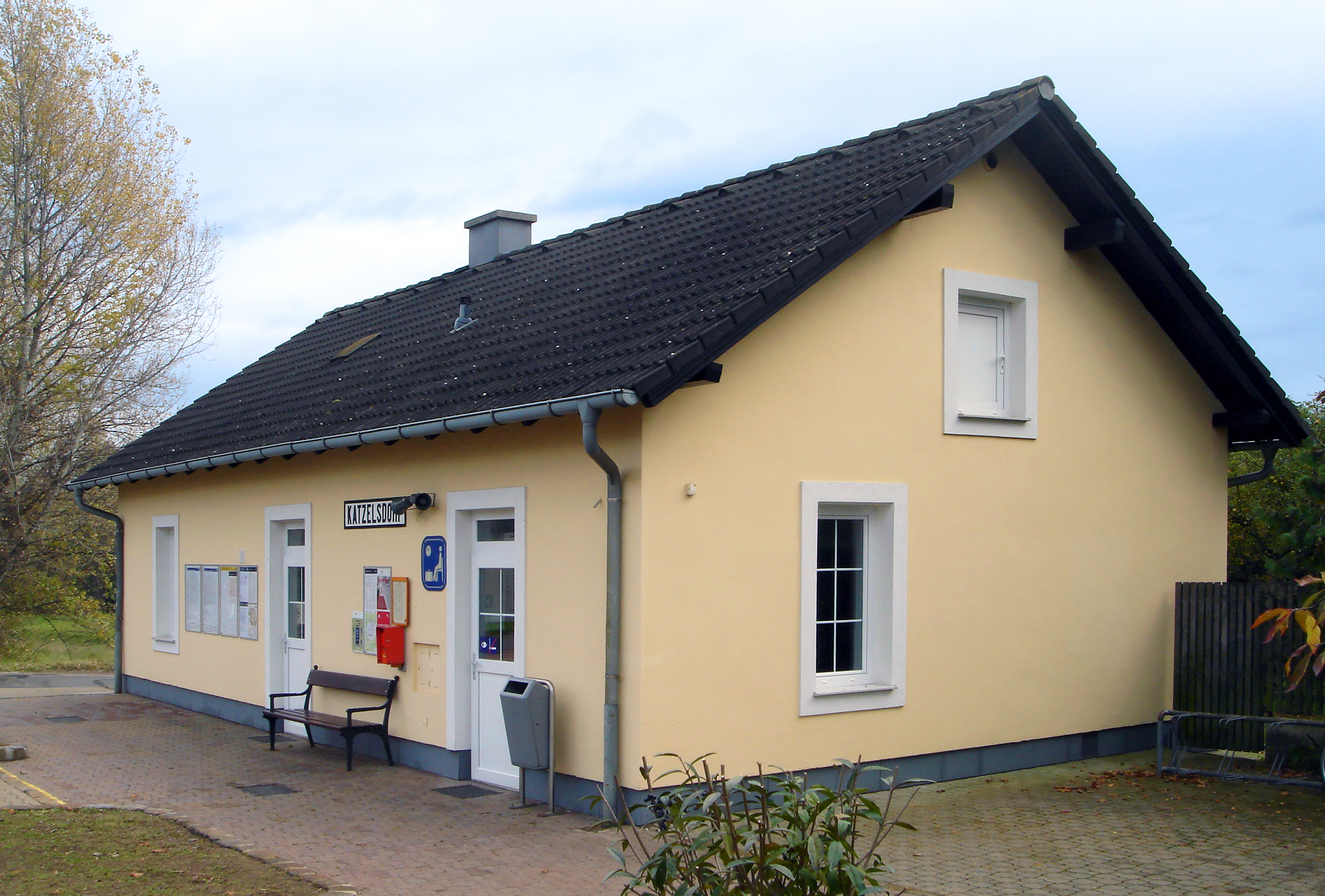 Bahnhofsgebäude Katzelsdorf, gleisseitig